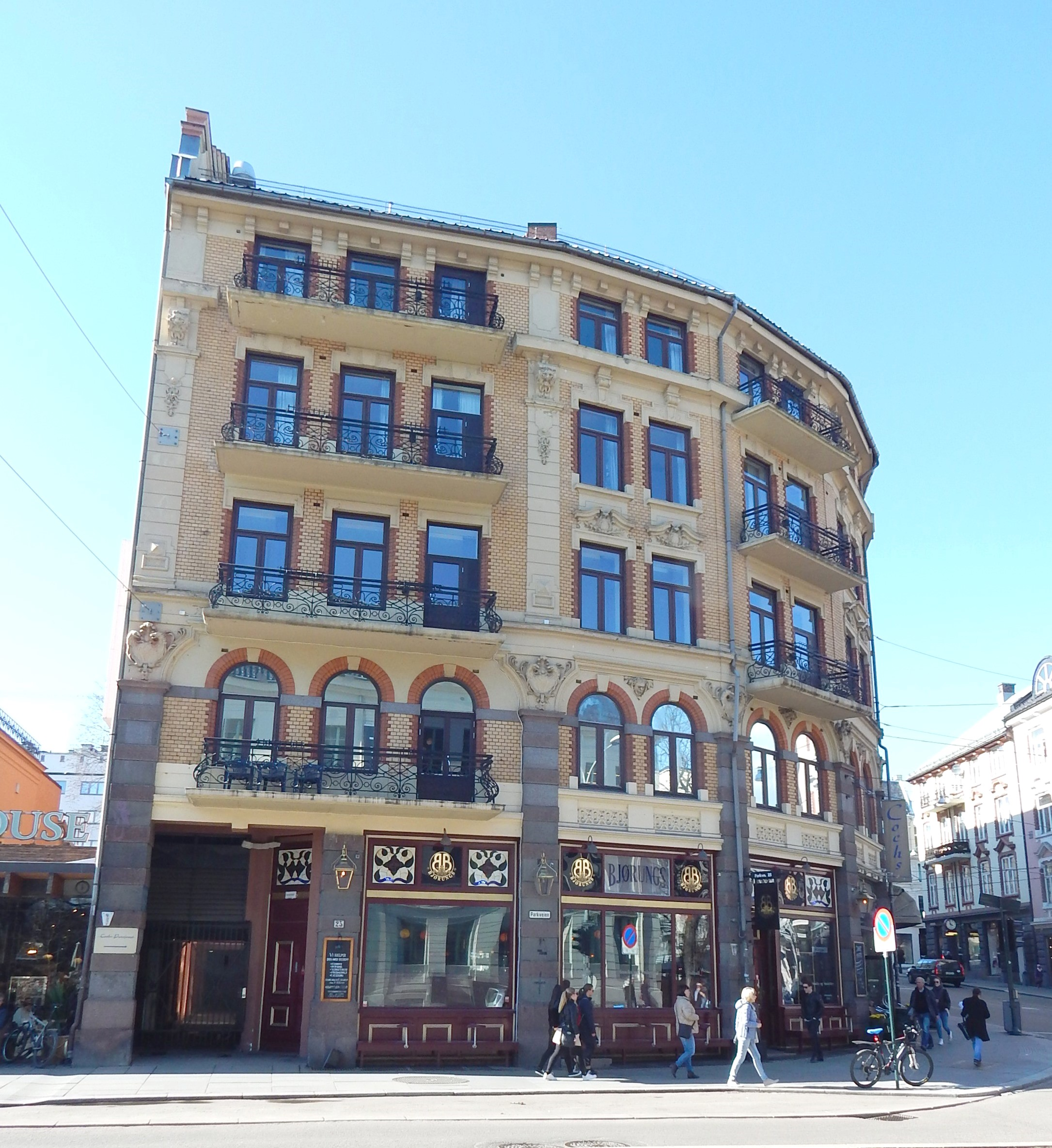 Parkveien 25. Arkitekt: Julius Foseid (1899).